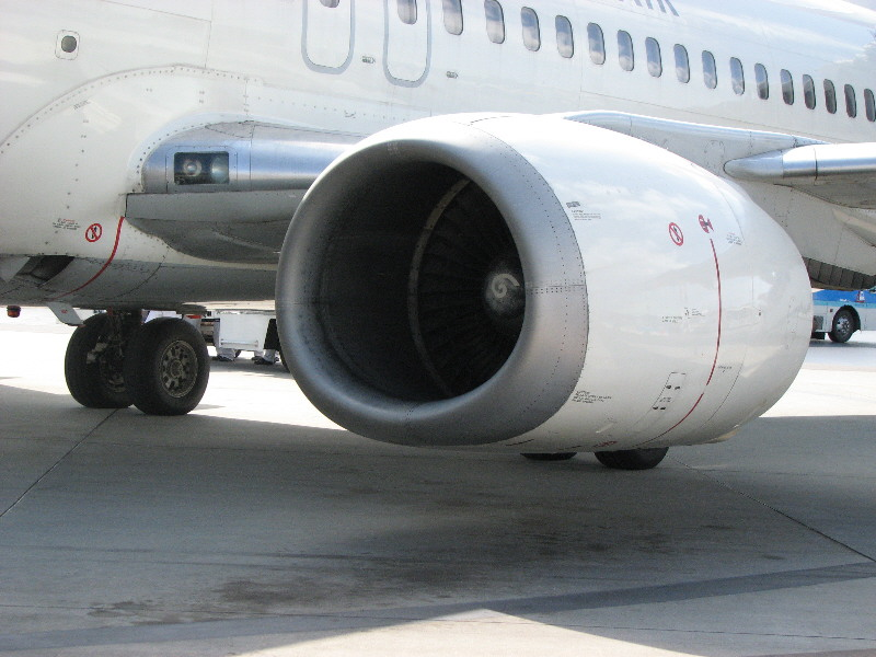 日本トランスオーシャン航空 B737-400 エンジンフェアリング(Japan TransOcean Airlines B737-400's Engine nacelles)